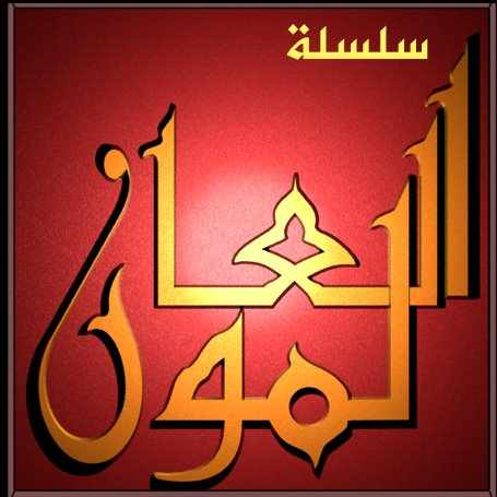 سلسلة العالمون / سلسلة شبه وثائقية تتحدث في أمور سياسية و اجتماعية و اعلامية عربية و اسلامية .